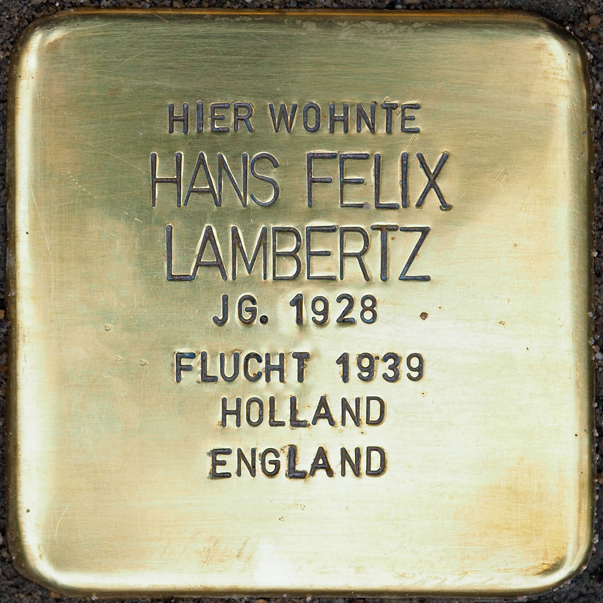 Stolpersteine in Kempen: Lambertz, Hans Felix